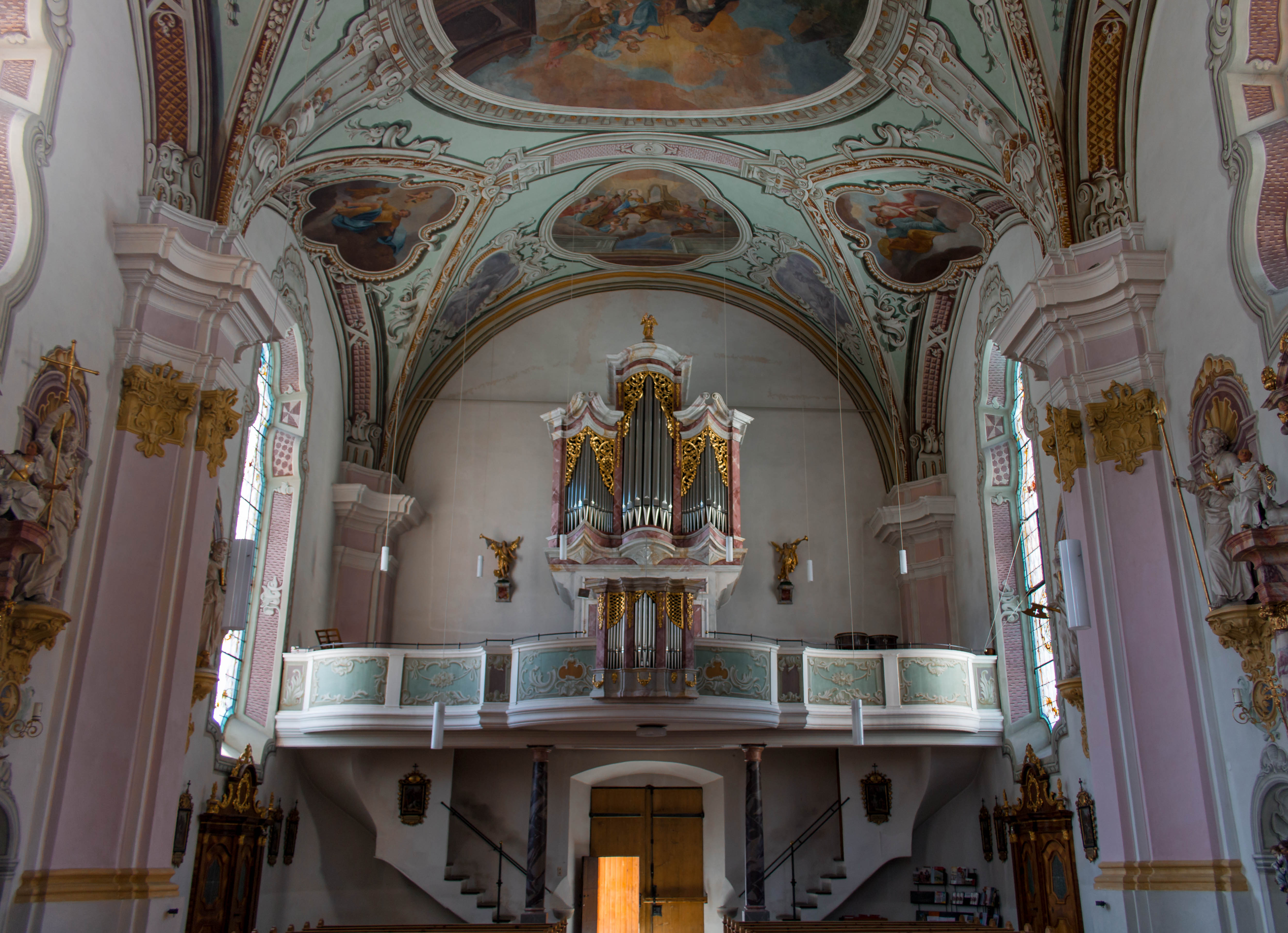 Orgel in der Pfarrkirche Maria Himmelfahrt (Sillian)